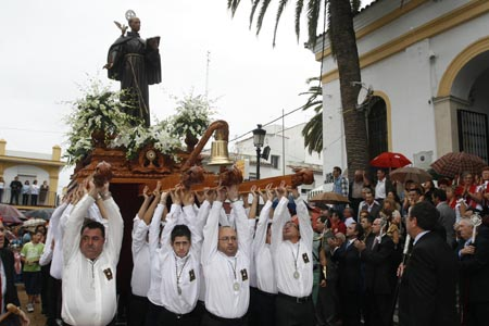 Patrón de San Pedro